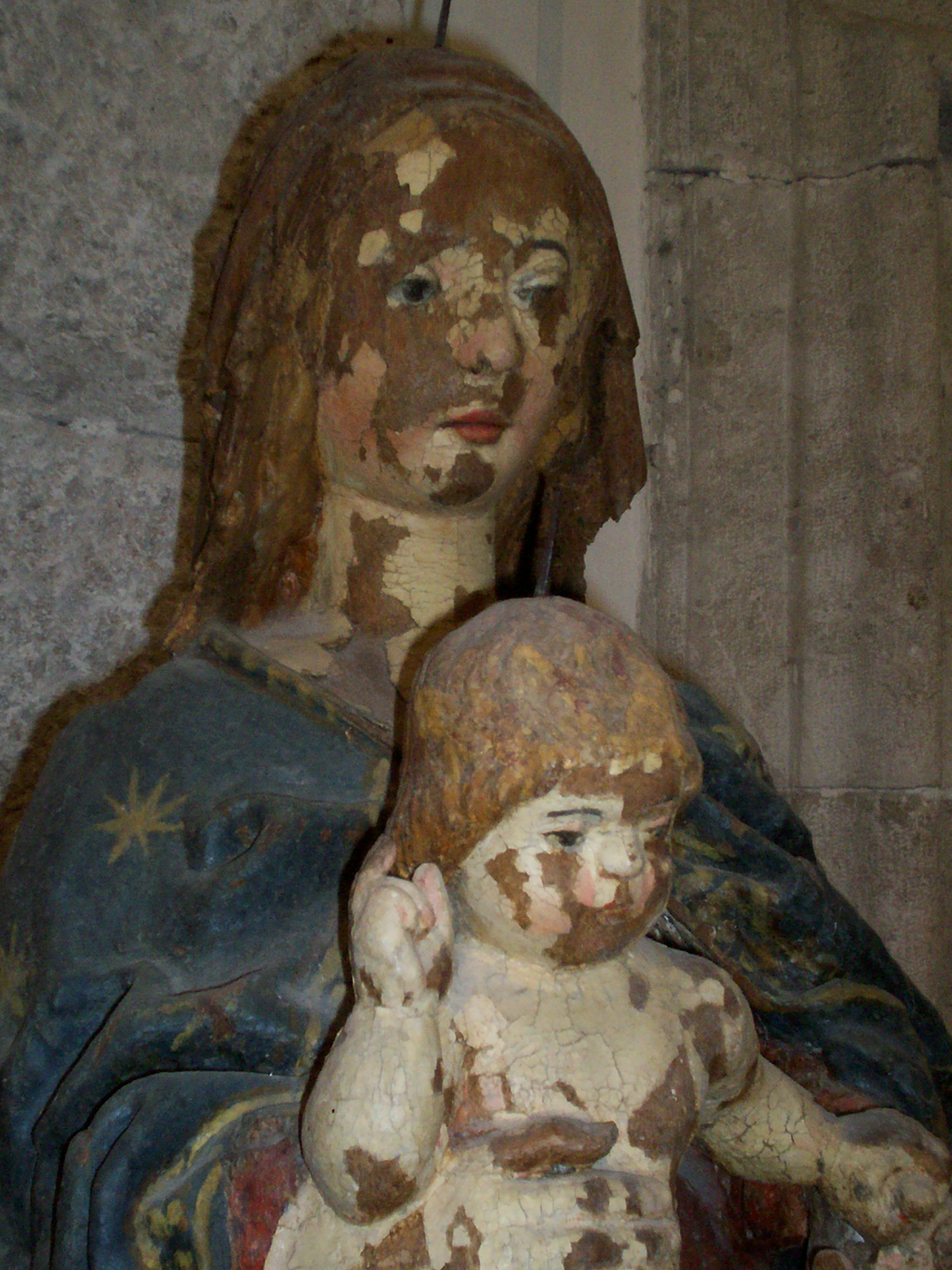 particolare statua della Madonna della Libera (XI secolo) in Cerreto Sannita